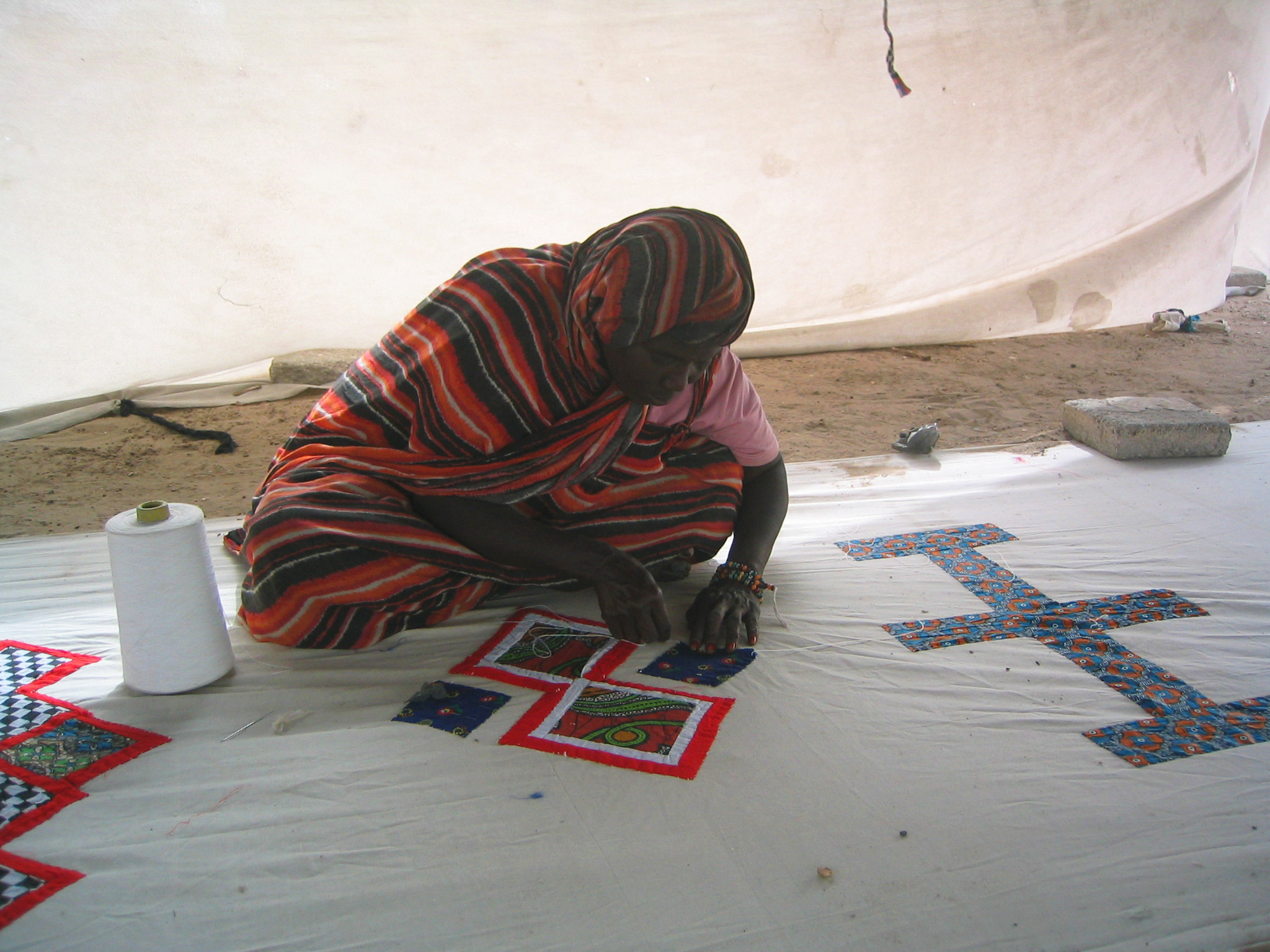 Marché aux tentes de Nouakchott (Mauritanie) : femme brodant une khaïma.